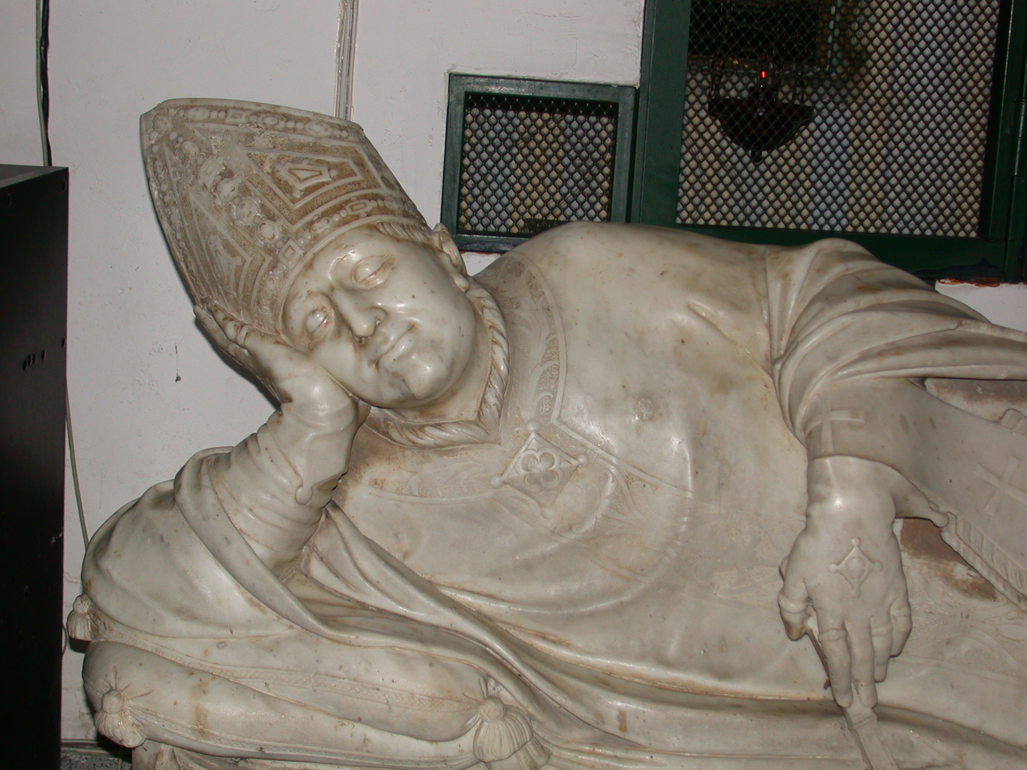 Statua di San Massimo (particolare)